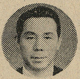 대한민국의 정치인